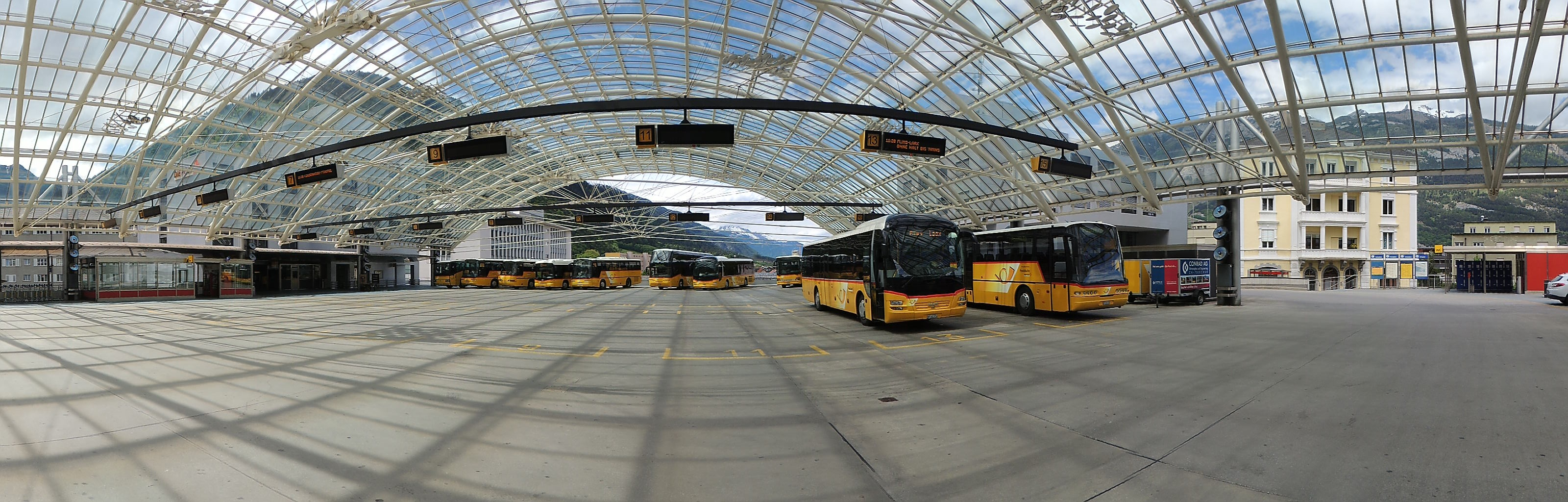 Foto vom Churer Busbahnhof